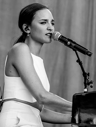 Typh Barrow en concert en juillet 2015